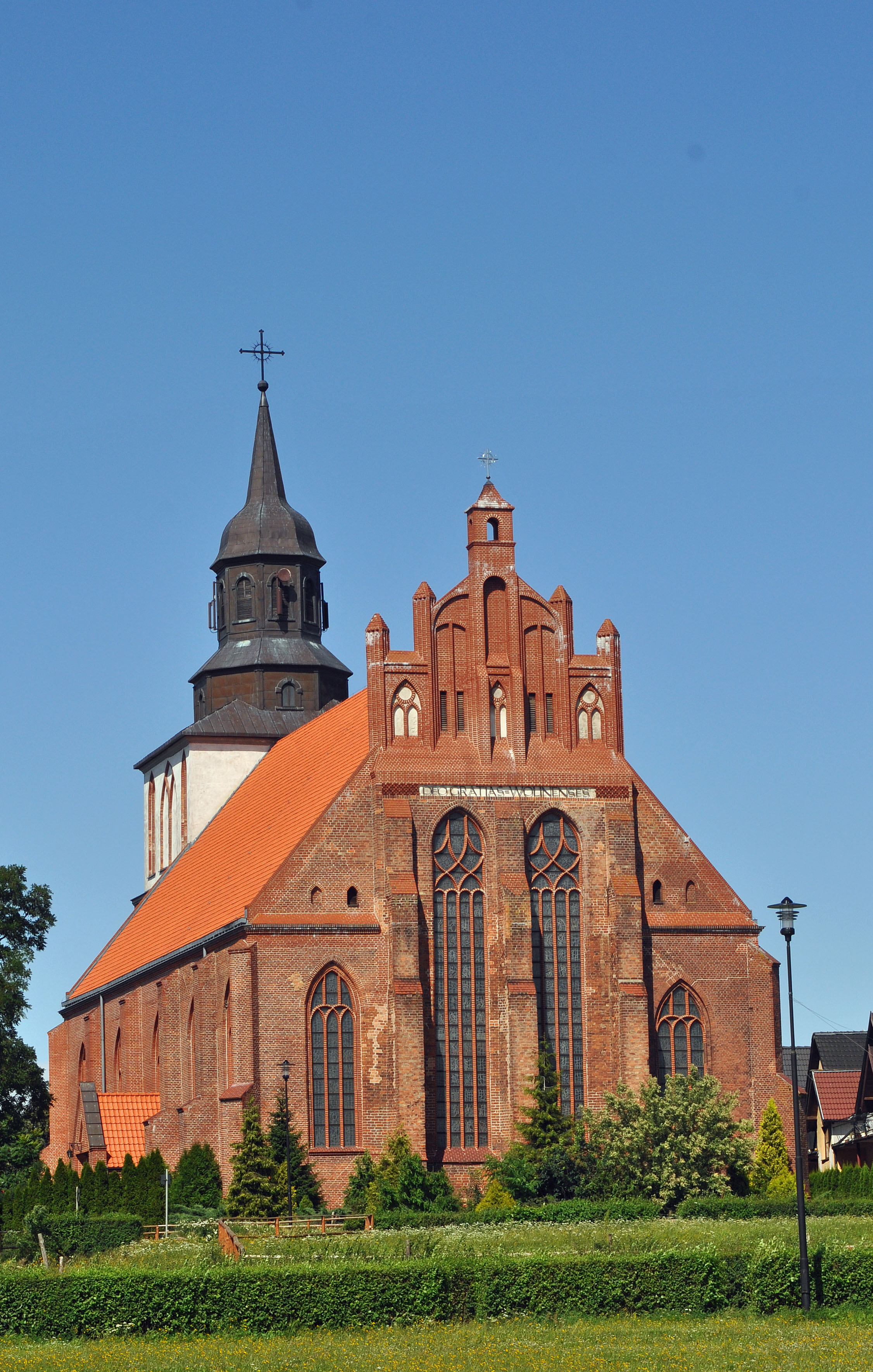 In Wolin (Polen). Aufgenommen am 24. Juli 2011.